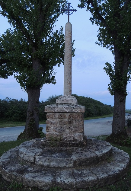 Croix Boissée, haute de 20 ou 30 cm et cerclée, en haut d'un cylindre d'1m50 environs posé sur un piédestale parallélépipédique de 75/80 cm environs posé au centre du second disque, le plus petit, lui même centré et au dessus du plus grand disque de pierre entre deux arbres à l'arrière plan et la route derrière encore